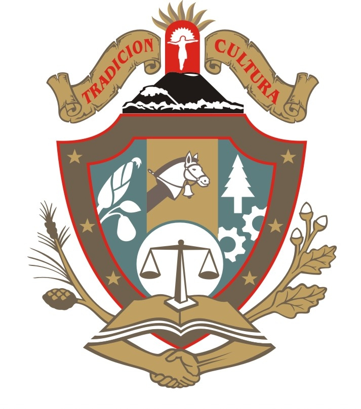 El escudo oficial del municipio de Nuevo San Juan Parangaricutiro